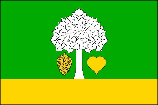 Vlajka obce Borová (okres Náchod)